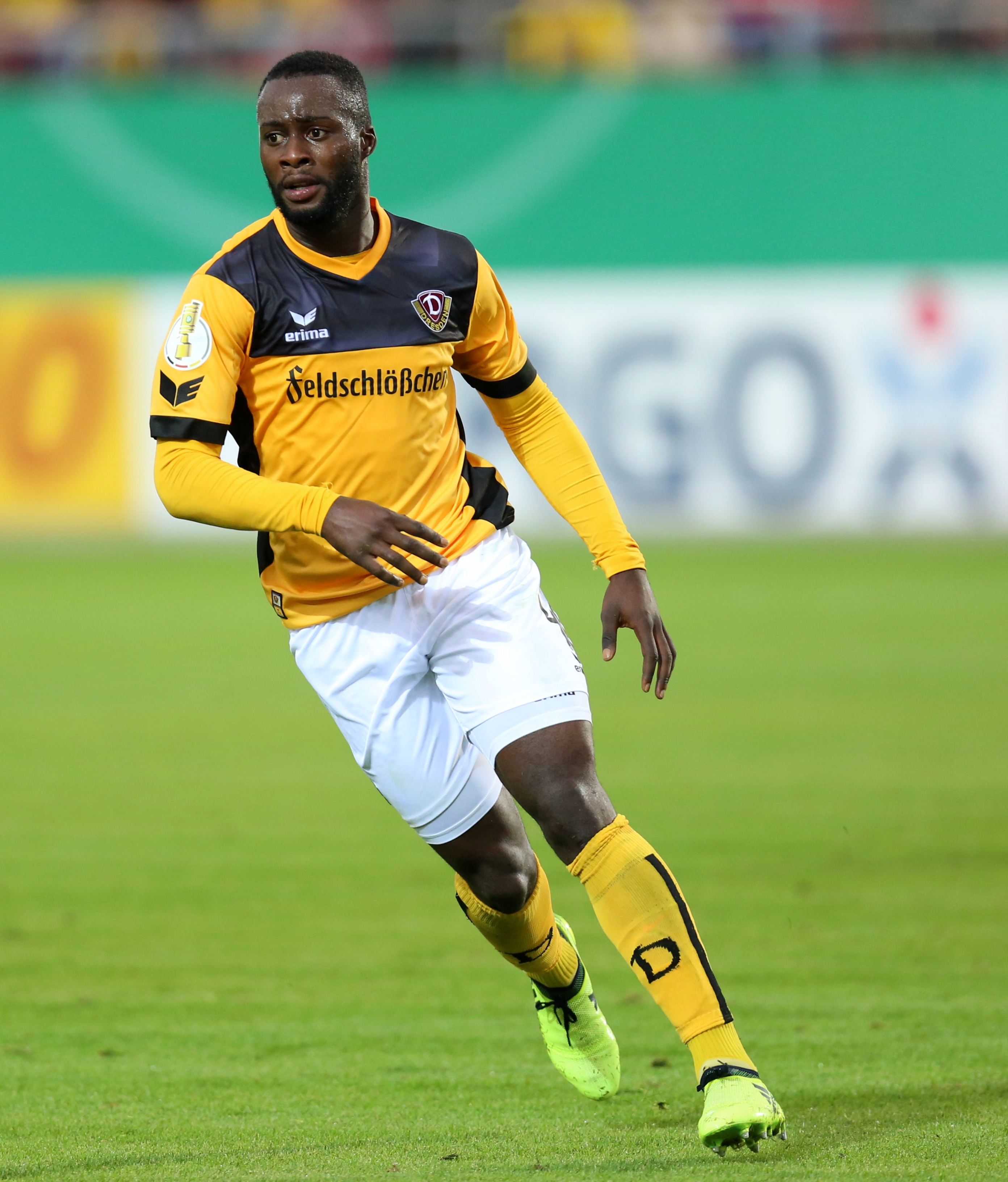 DFB-Pokal 2017/18, 1. Hauptrunde, TuS Koblenz gegen SG Dynamo Dresden: Erich Berko (SG Dynamo Dresden)